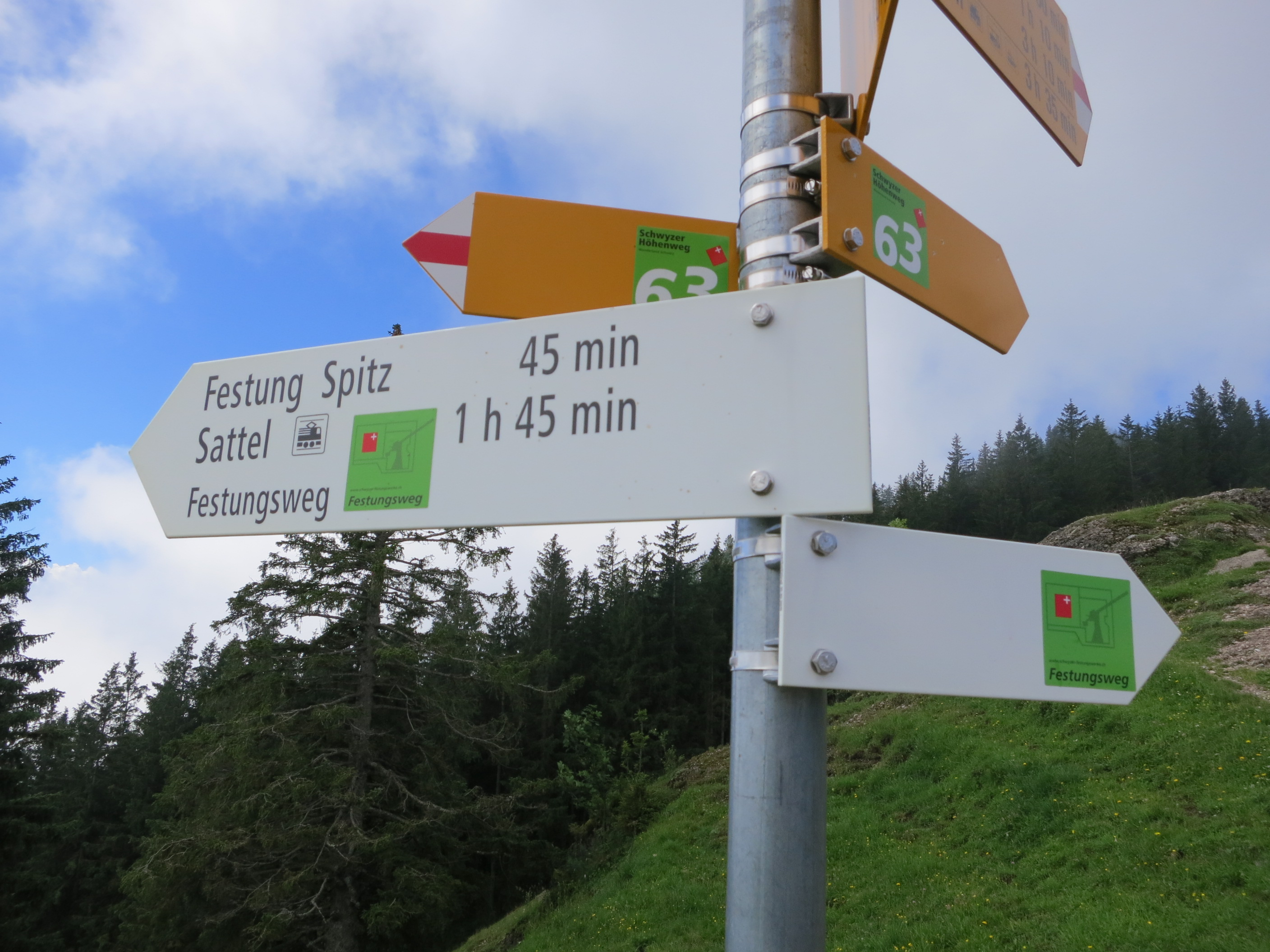 Festungsweg, Sattel, Schweiz